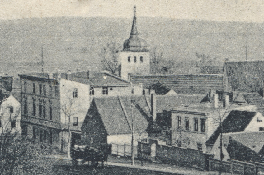 Blick auf die Stephanuskirche Westerhüsen von der Sohlener Straße aus, Aufnahme vermutlich schon in den 1890ern